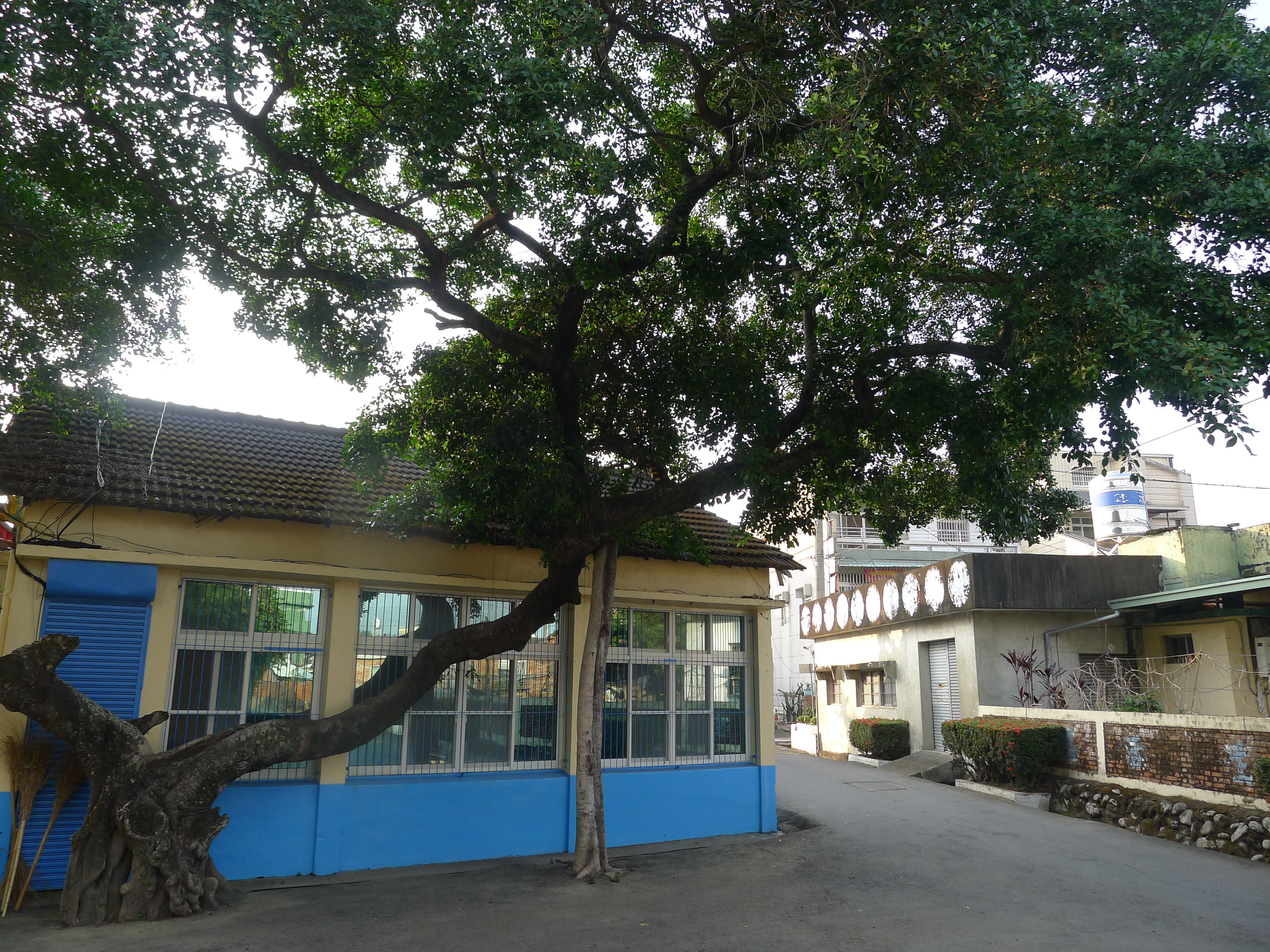 金蘭村